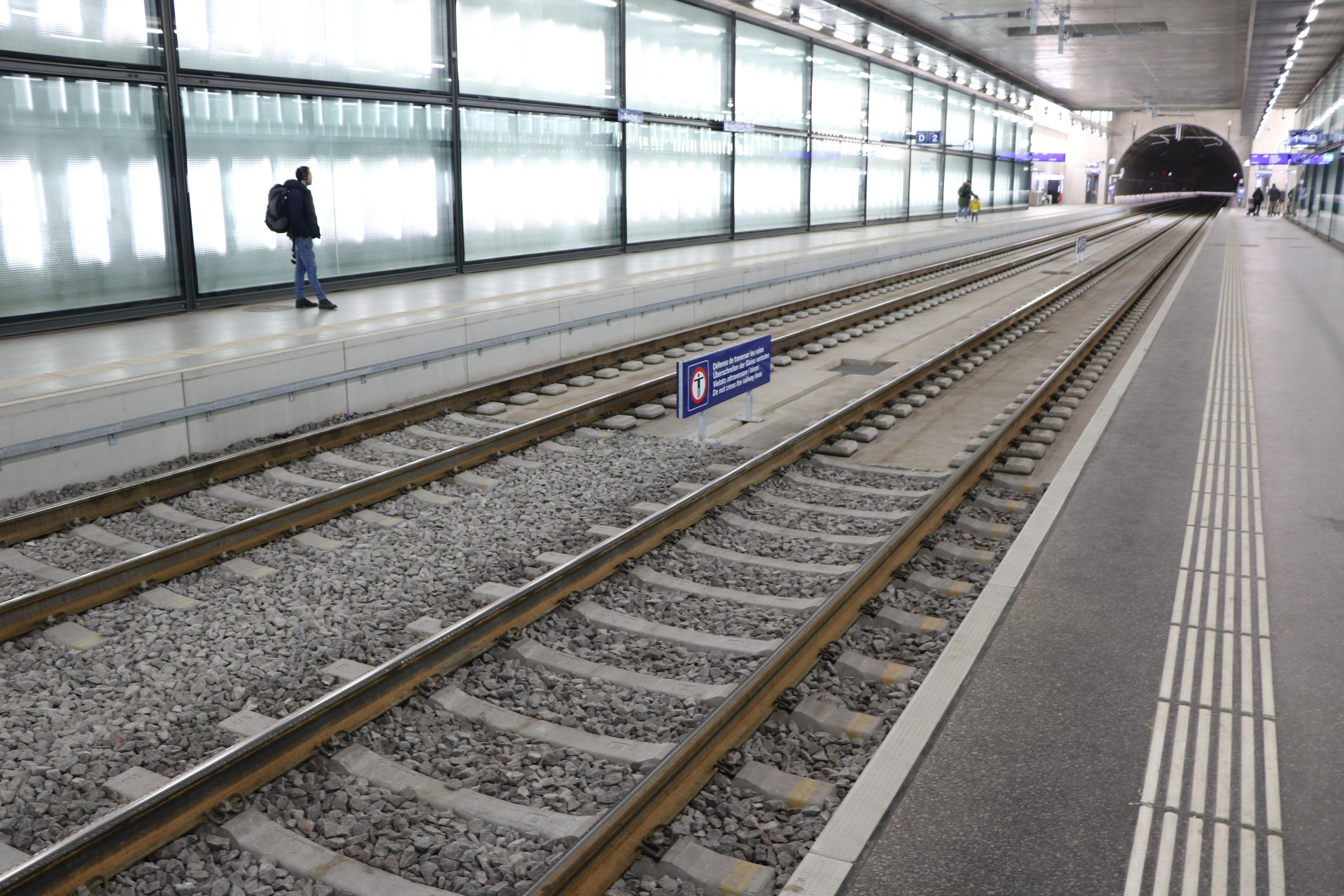 Übergang Schotteroberbau Feste Fahrbahn in der Haltestelle Lancy-Bachet. Die letzten Meter Schotteroberau wurden verklebt.